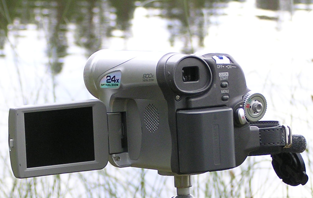 Videokamera